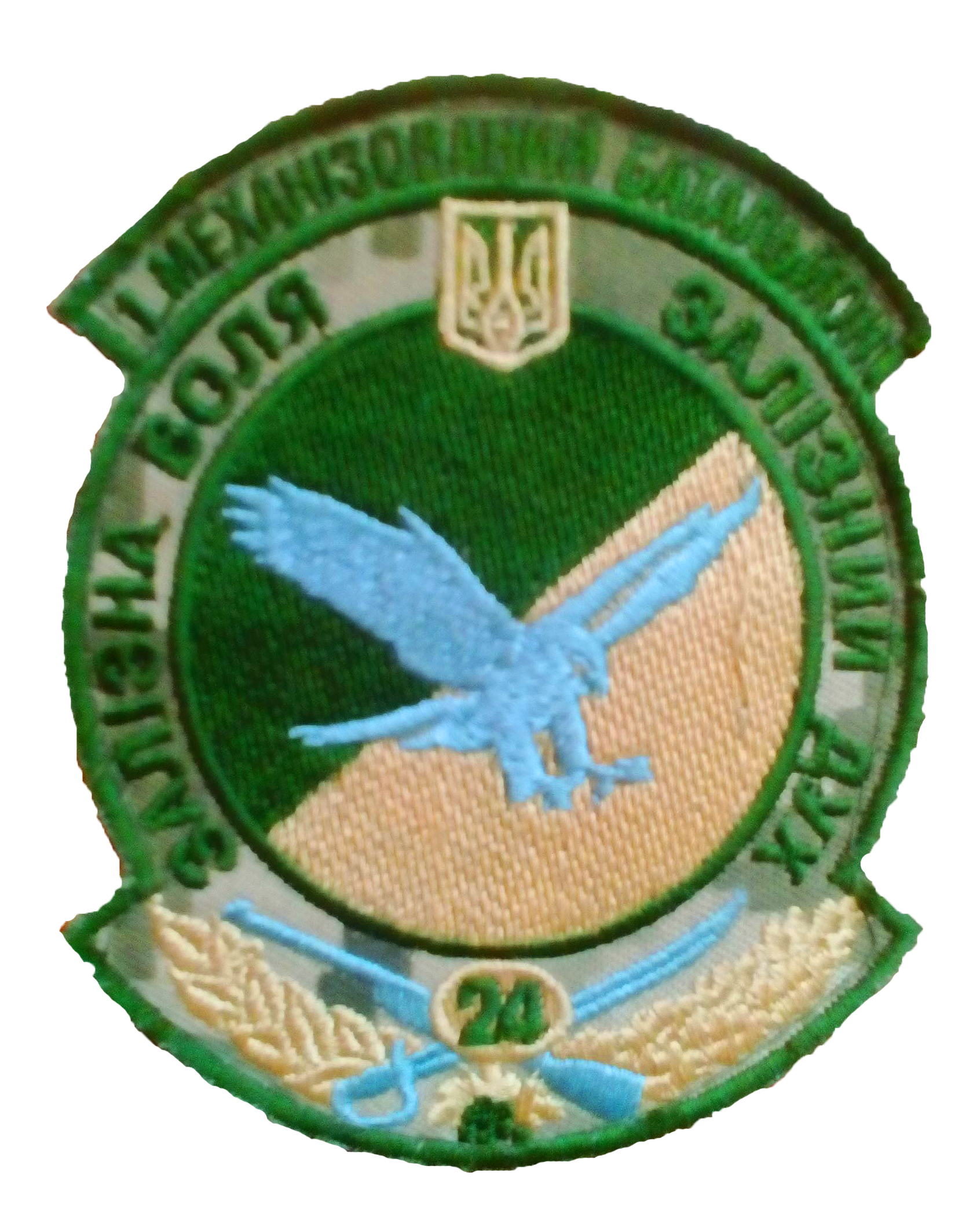 Нарукавний шеврон 1 окремого механізованого батальйону 24 ОМБр